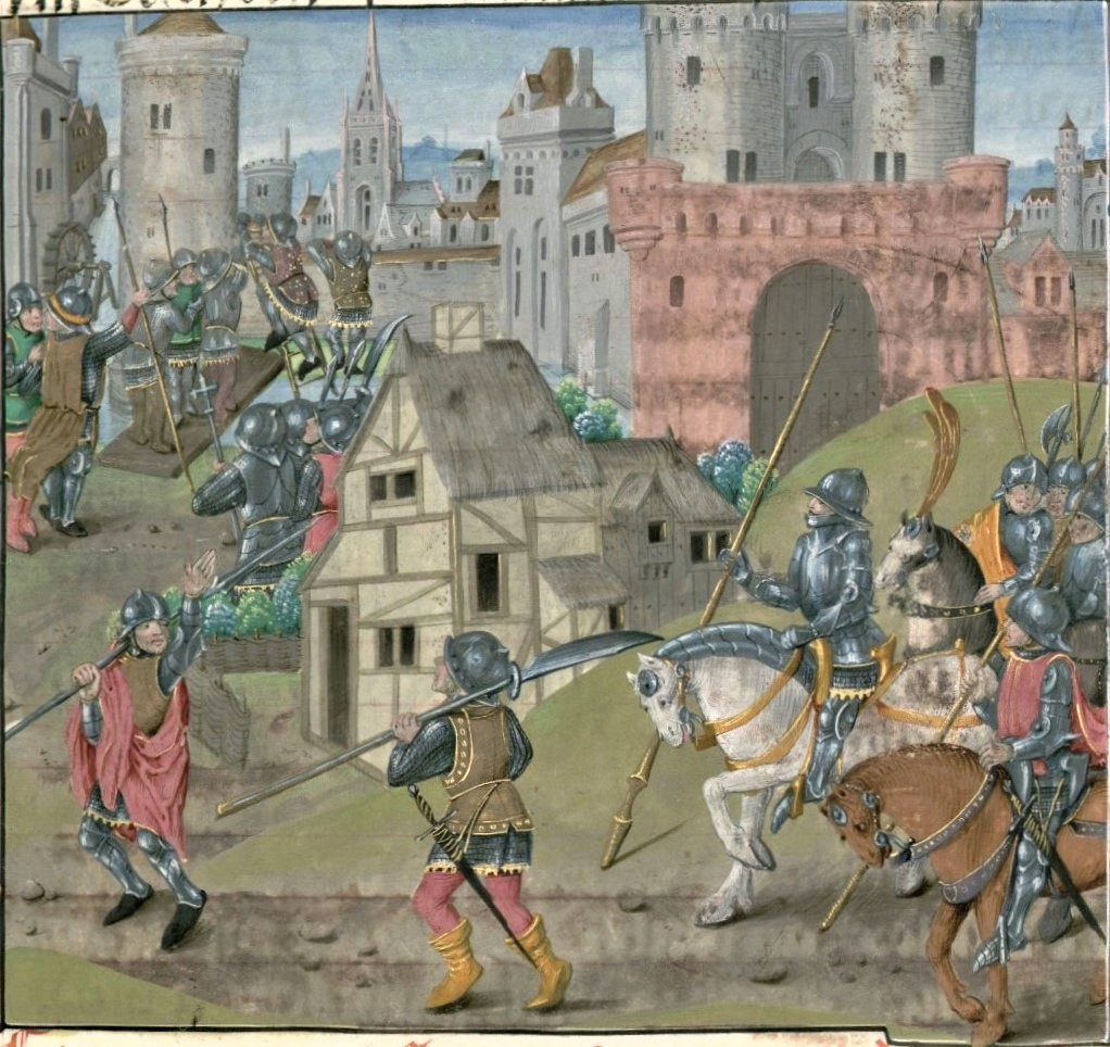 Miniature dépeignant la prise de la ville fictive de Crathor.